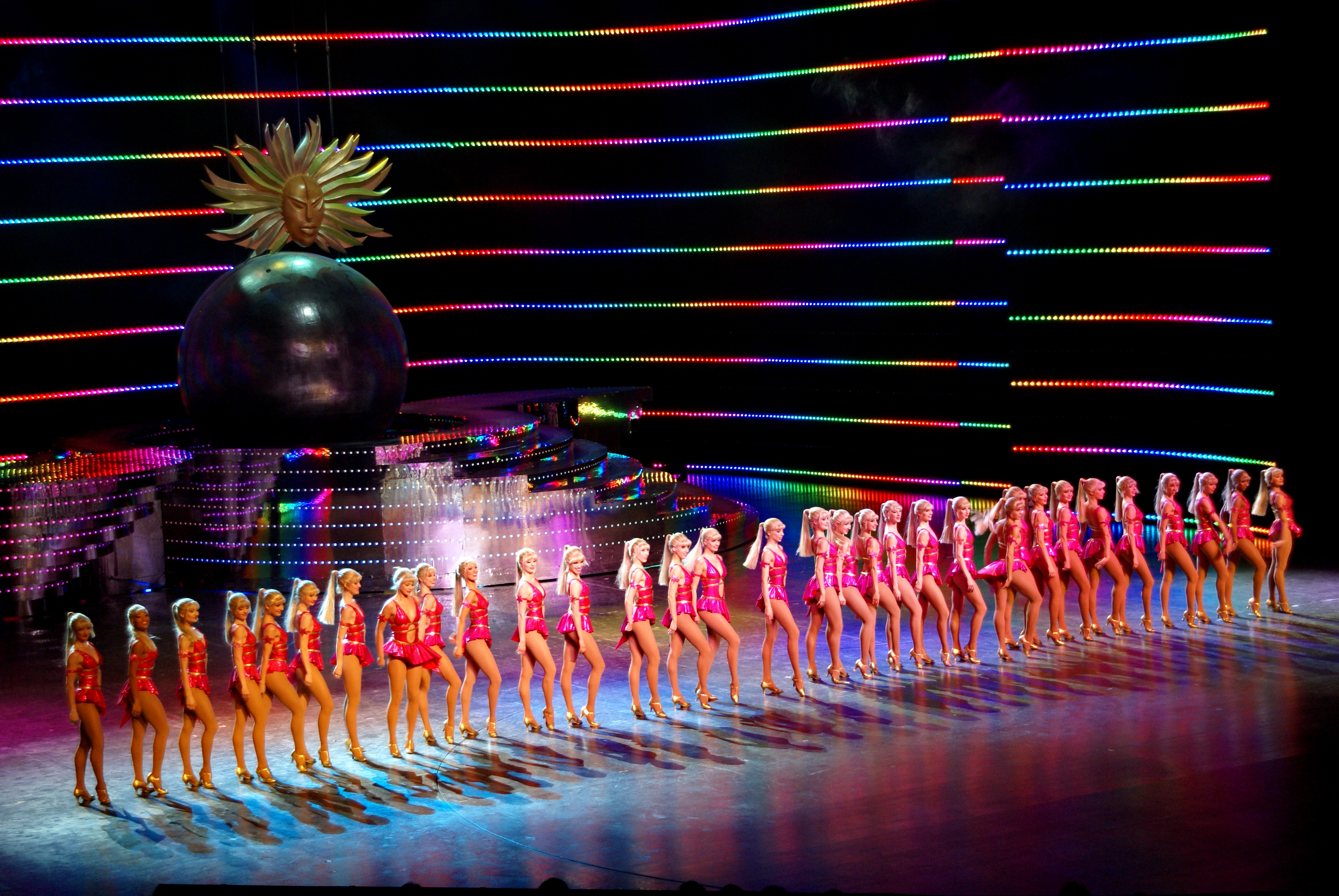 berlin3